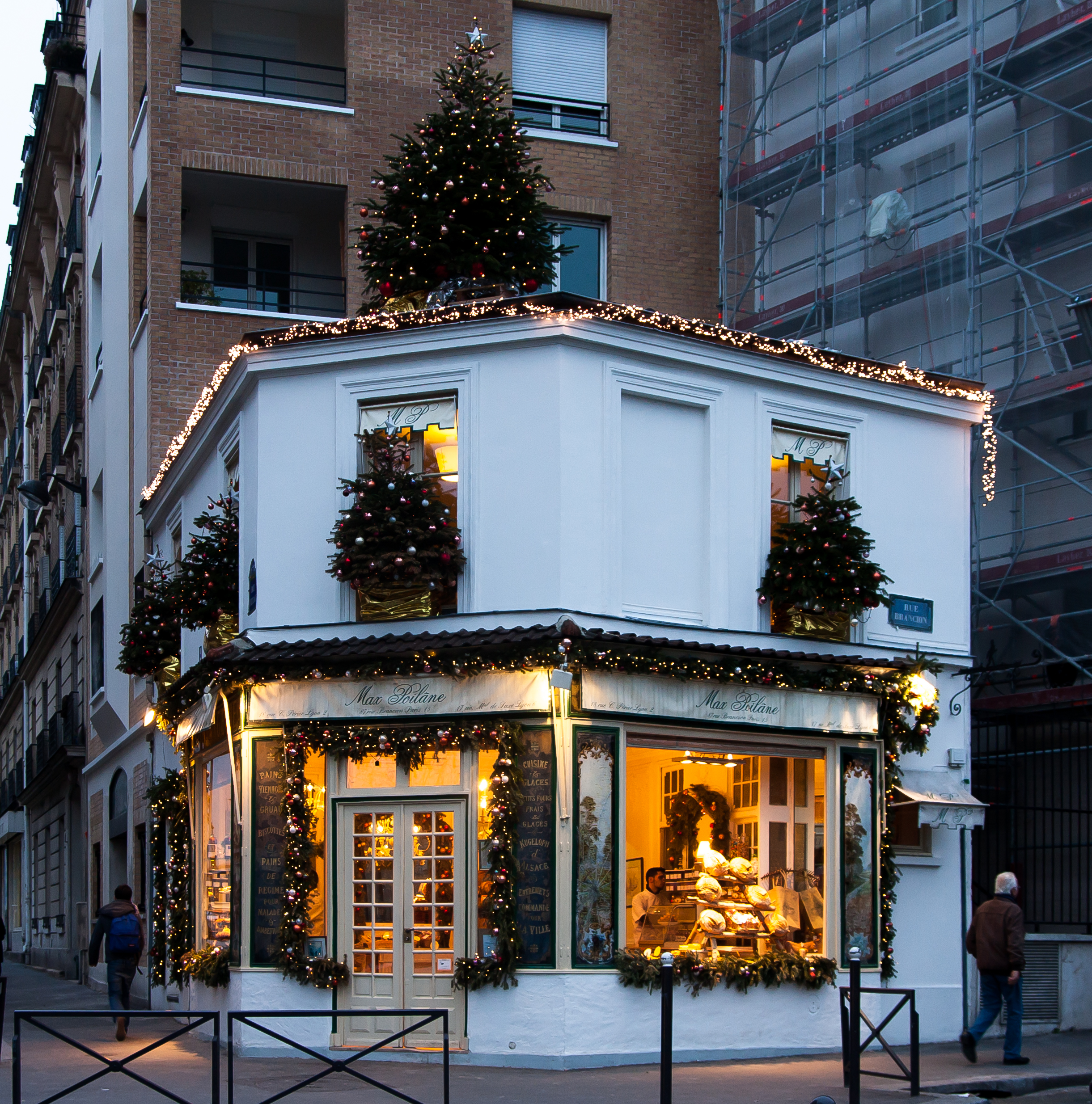 Rue Brancion / Rue Fizeau, Paris.